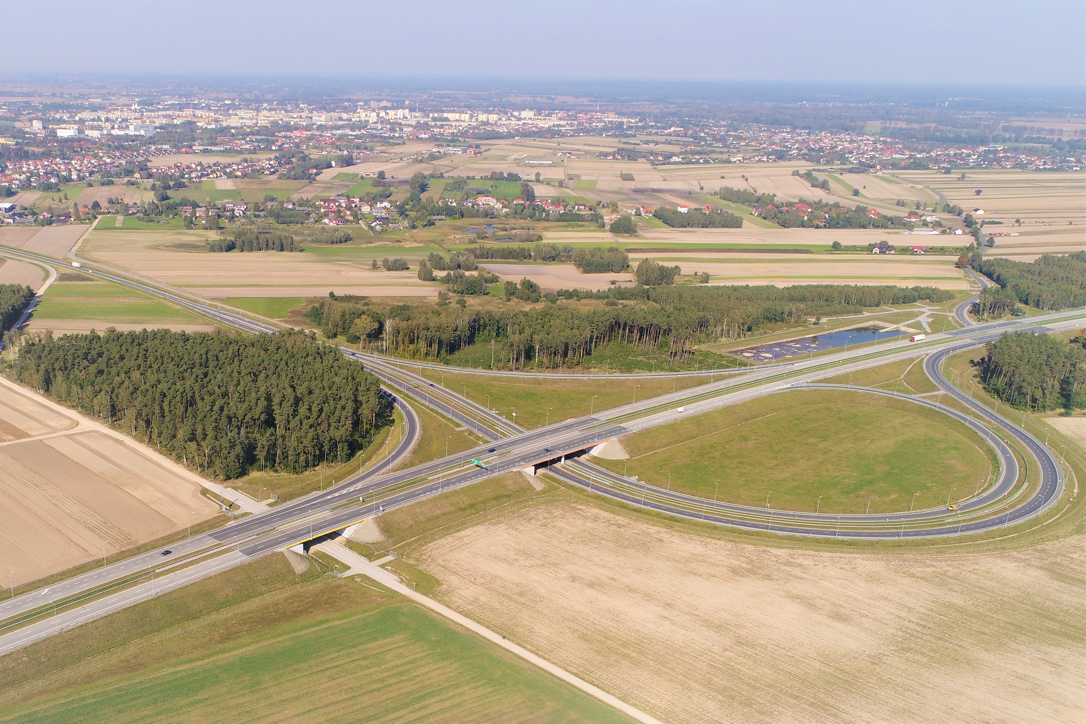 Droga ekspresowa S8 - Węzeł Sieradz-Południe